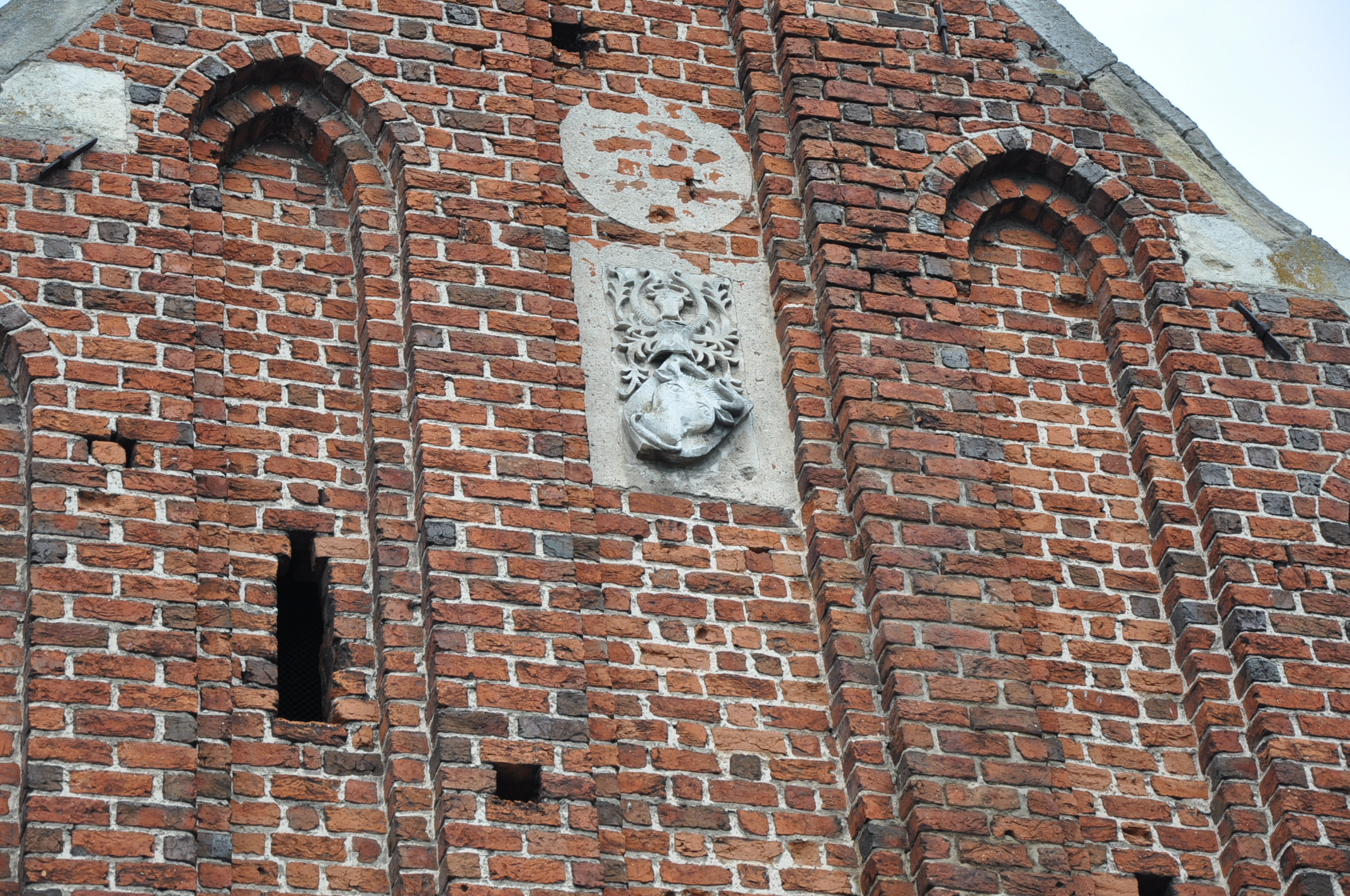 Wiślica. Dom Długosza.Herb Wieniawa.